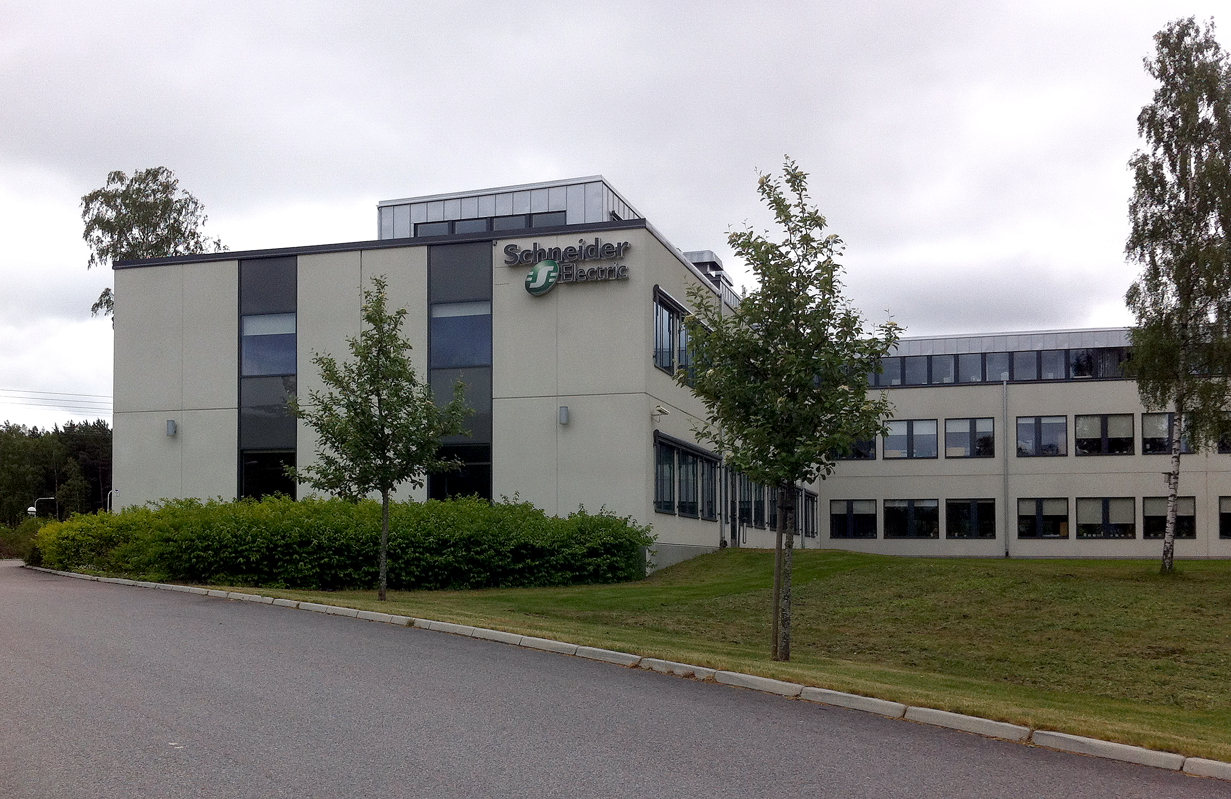 Schneider-Electrics huvudkontor i Oppeby, Nyköpings kommun